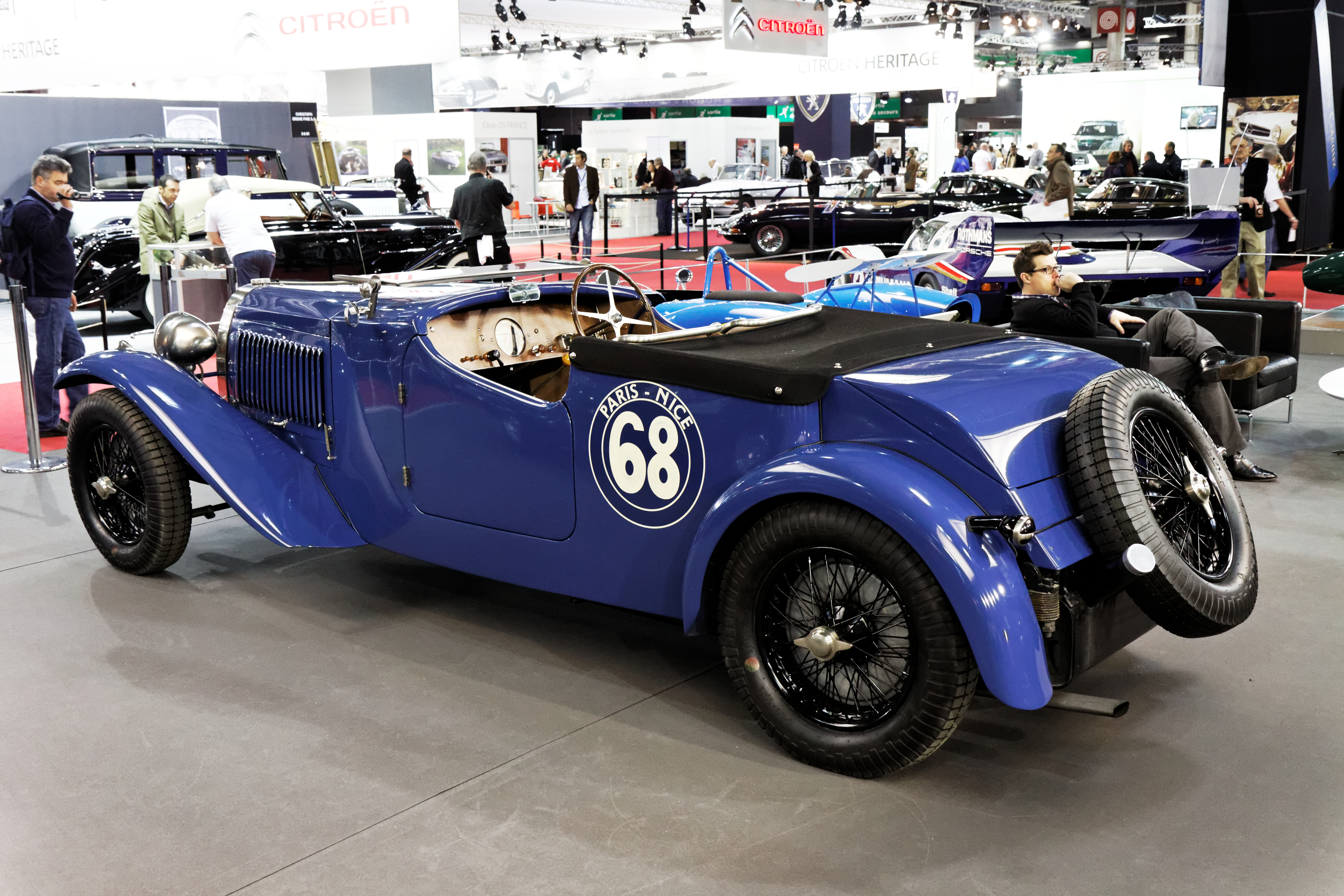 Une Bugatti T57 présentée lors du salon Retromobile 2013.